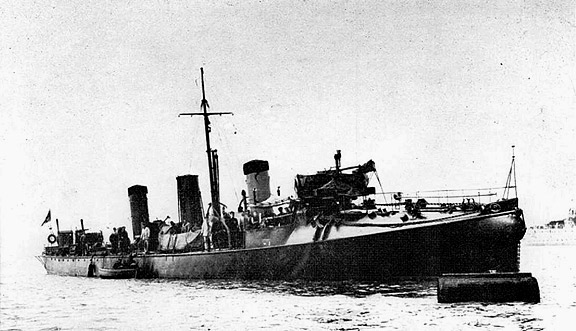 Der britische Zerstörer HAVOCK 1900 nach Umbau